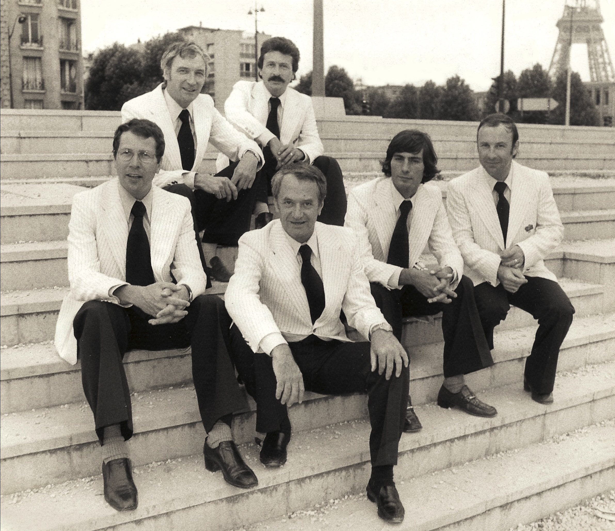 Equipe des sports G Dominique, P Cangioni, G De Caunes, A Escubé, P Fulla, Jean Raynal